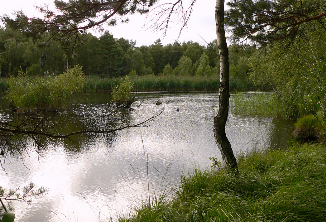 Gewässer im Vogelmoor